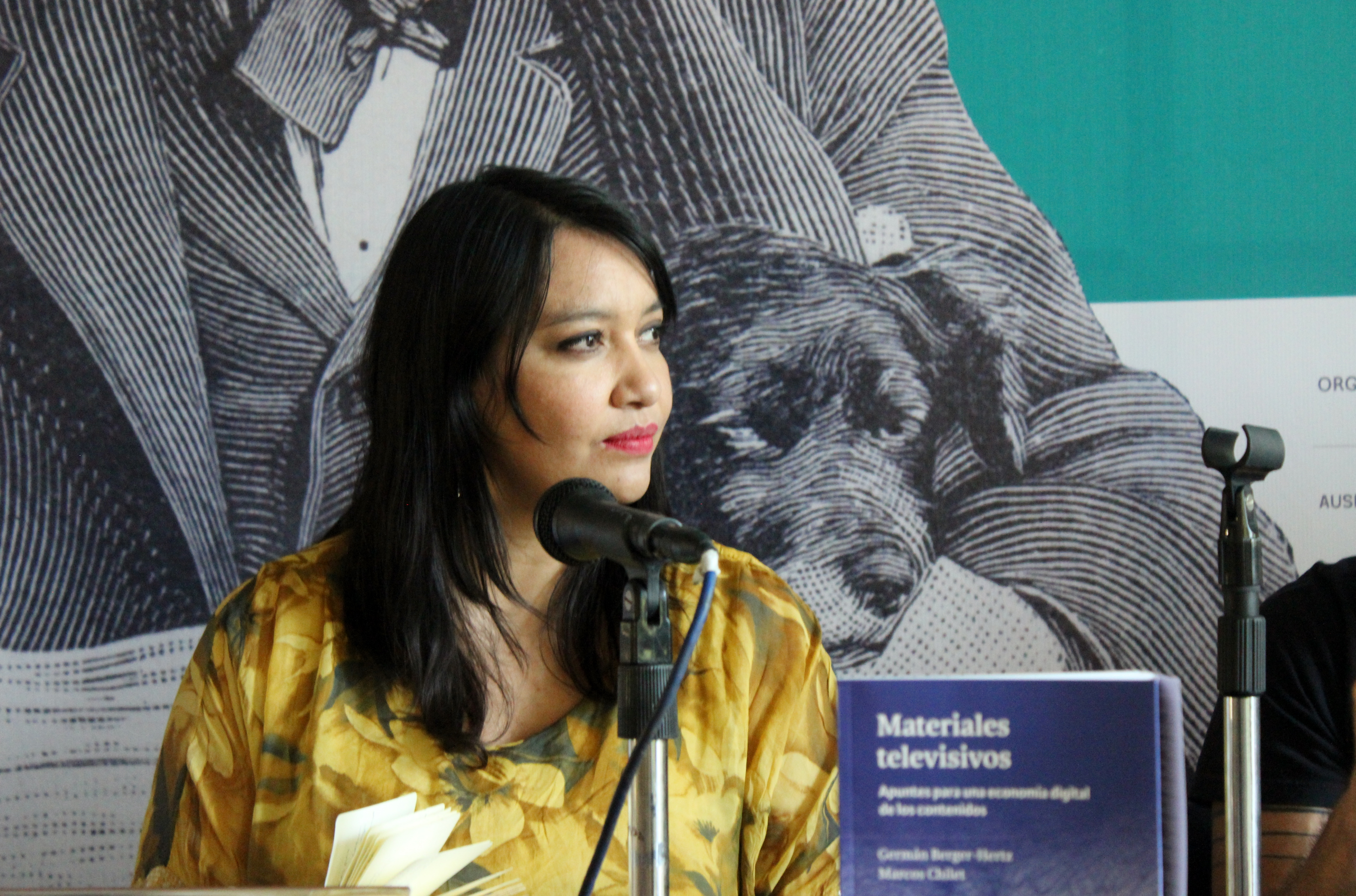 La abogada y política chilena Natalia Castillo, militante del partido Revolución Democrática y diputada por el Frente Amplio, durante la mesa Cómo pensamos el futuro de la televisión con responsabilidad pública, celebrada en la Feria Internacional del Libro de Santiago 2018 (sala Camilo Mori, 10 de noviembre).